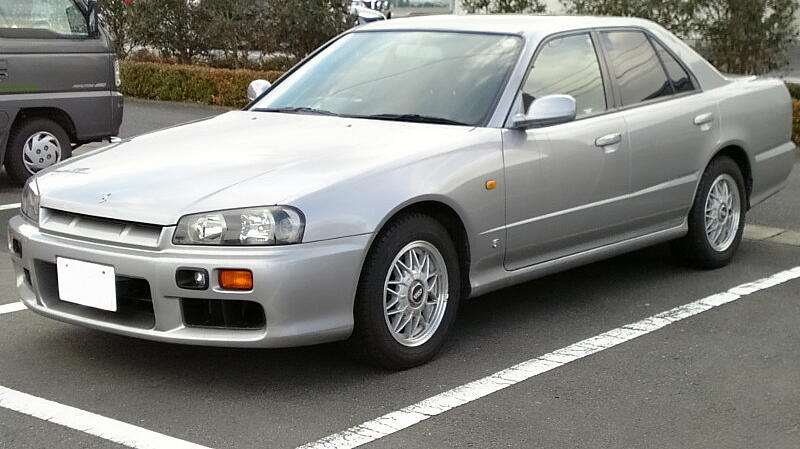 R34型日産・スカイライン（前期型）